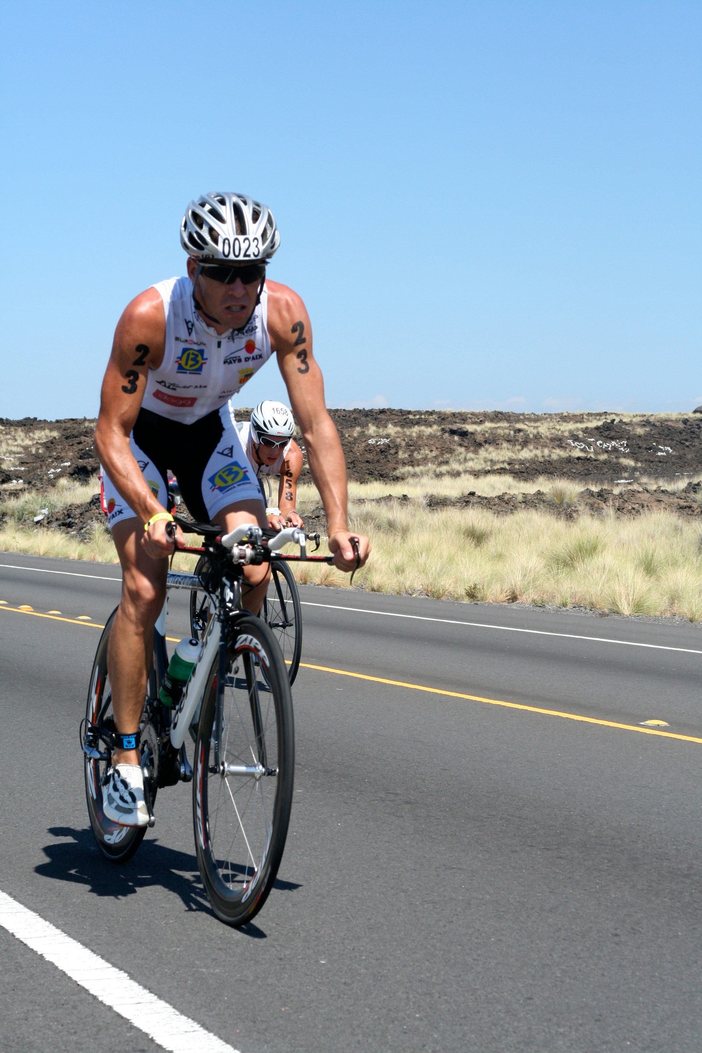 Xavier Le Floch Ironman Hawaï 2007